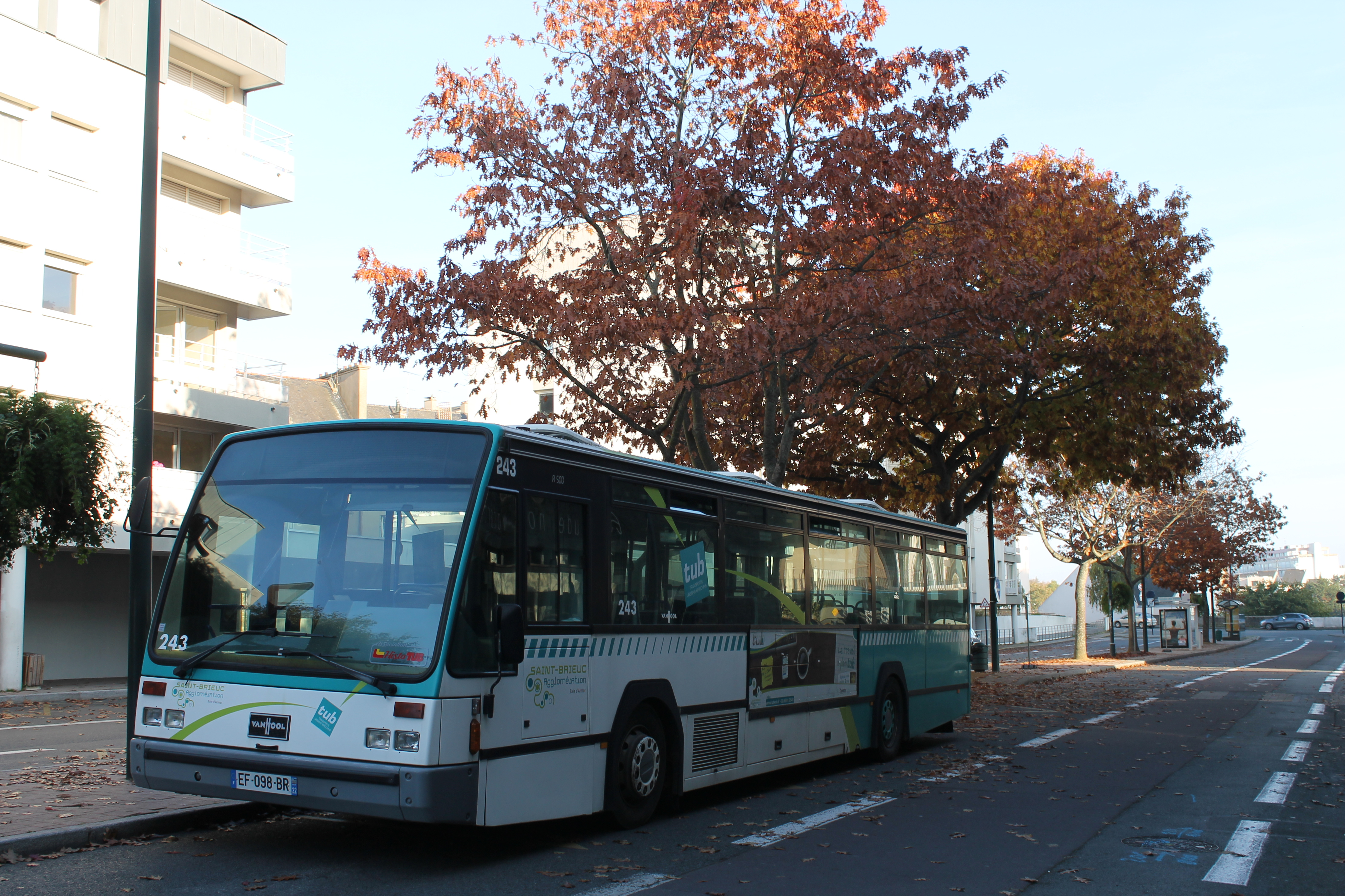 Van Hool A500 n°243 - HistoTUB - Combat des Trente